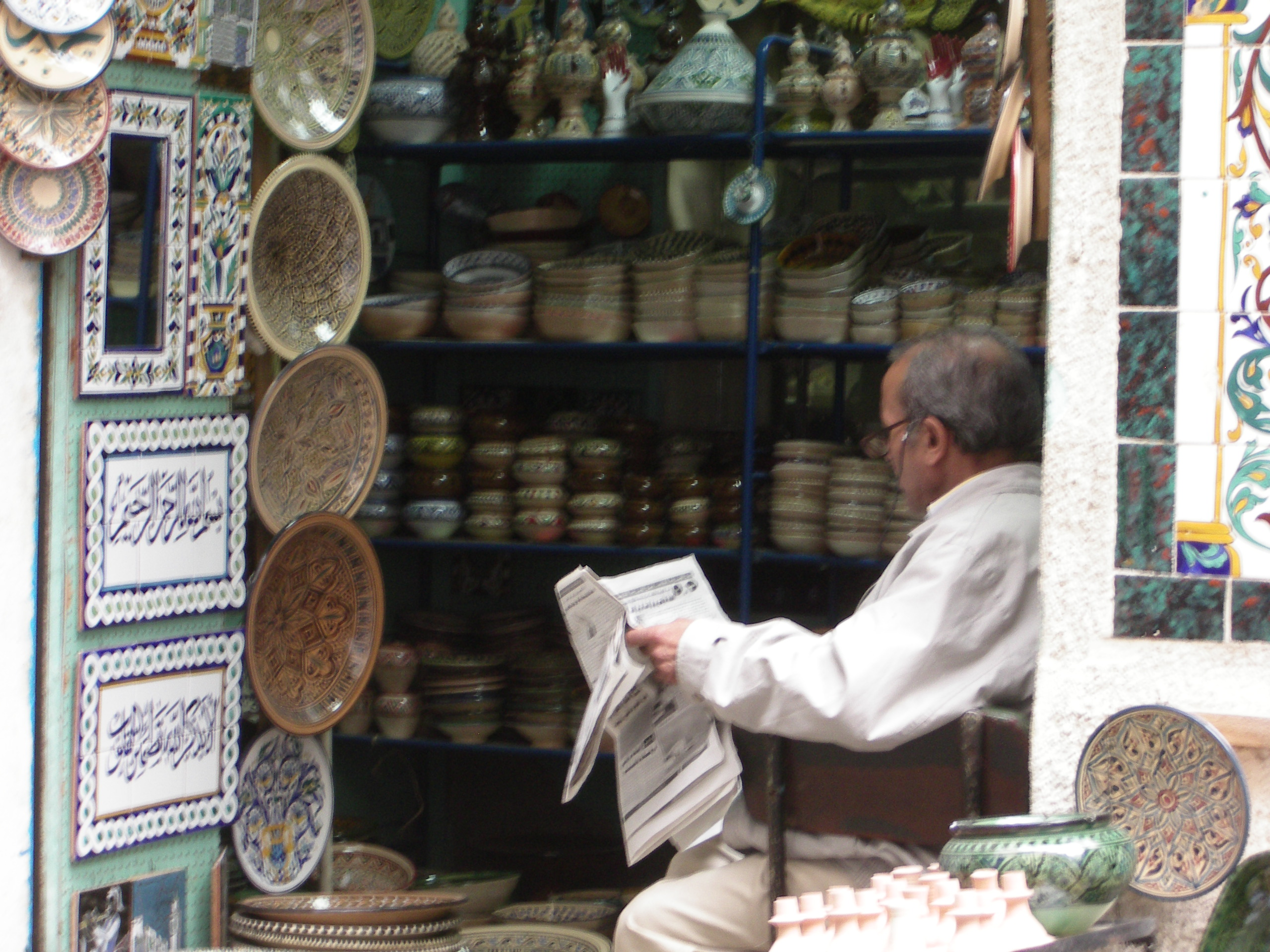 Boutique de la médina de Tunis